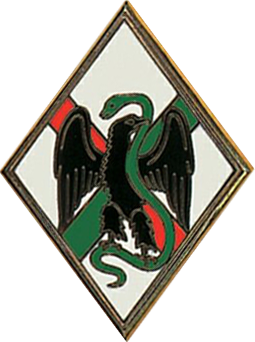 Coome l'insigne régimentaire du 1er régiment étranger, il reprend les armes du Mexique